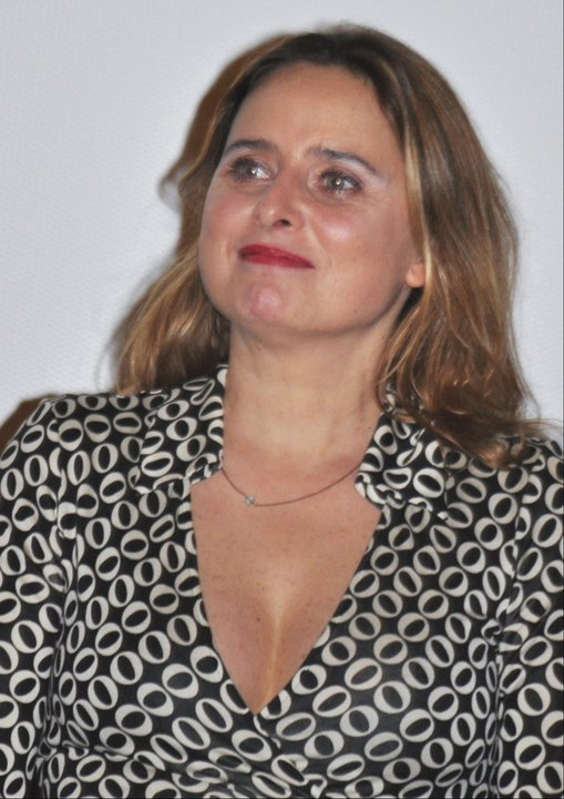 L'actrice Carole Franck